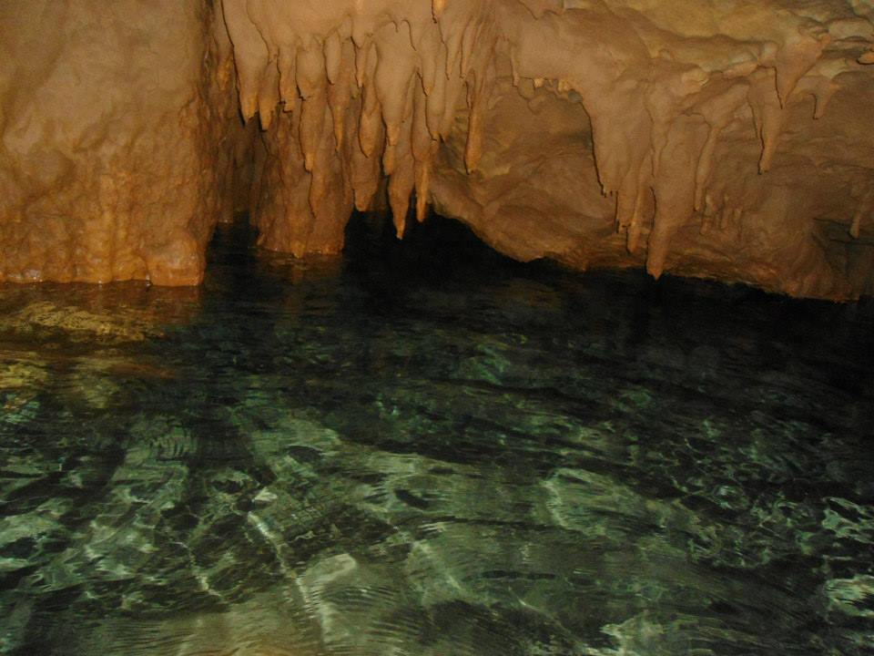 turismo